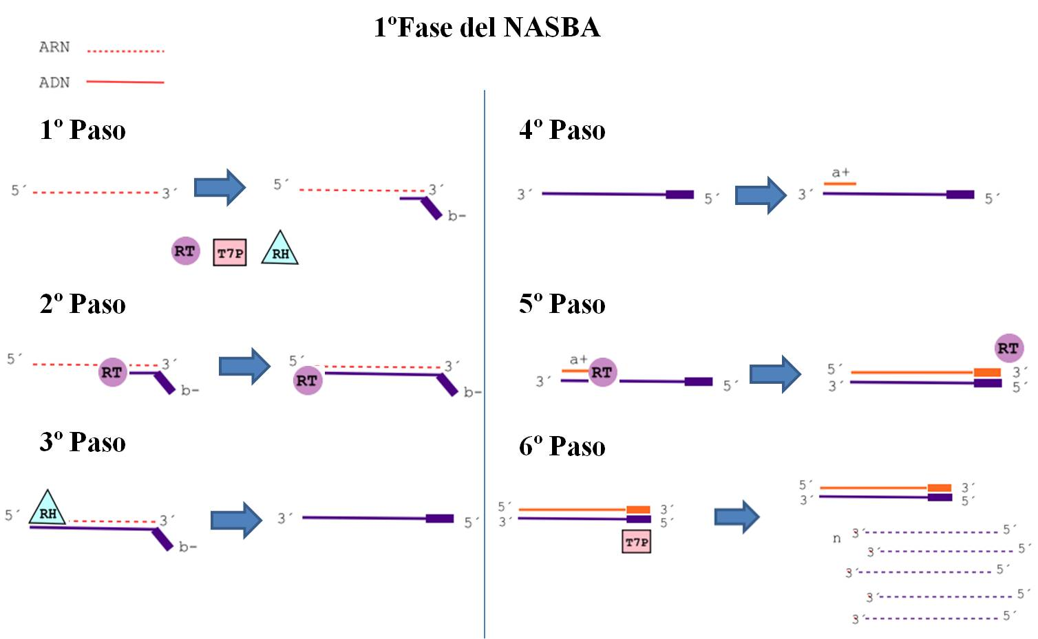 En esta imagen se observa la primera fase del NASBA.